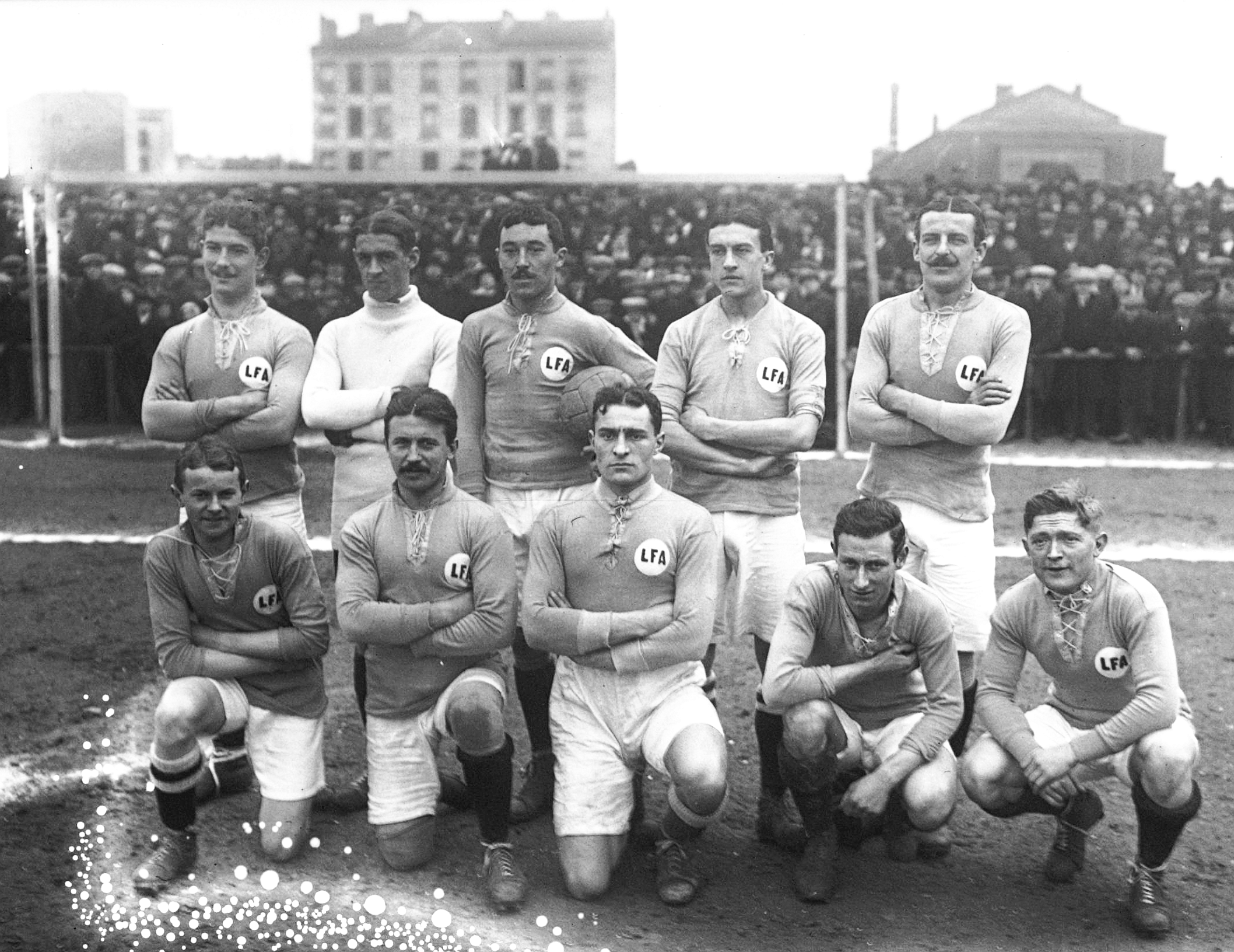 Sélection de football de la LFA (ligue parisienne de football) le 15 mars 1914, Saint-Ouen. Debout : Lucien Gamblin (Red Star), Germann (US Suisse), Gaston Barreau (FEC Levallois), Maurice Bigué (CA Paris), Scheibenstock (CA Paris). Accroupis : Maurice Gastiger (FEC Levallois), Louis Mesnier (CA Paris), Émilien Devic (Red Star), Félix Romano (II) (FEC Levallois), Marcel Triboulet (FEC Levallois). Le onzième joueur, Albert Jourda (CA Vitry), est absent de la photo. Ce cliché de 1914 ne porte pas de mention sur l'identité du photographe mais seulement le nom de l'agence de photo : "Rol". C'est donc un cliché dit "anonyme" qui tombe dans le domaine public en France 70 ans après sa publication. Voir aussi Conditions d'utilisations des clichés de